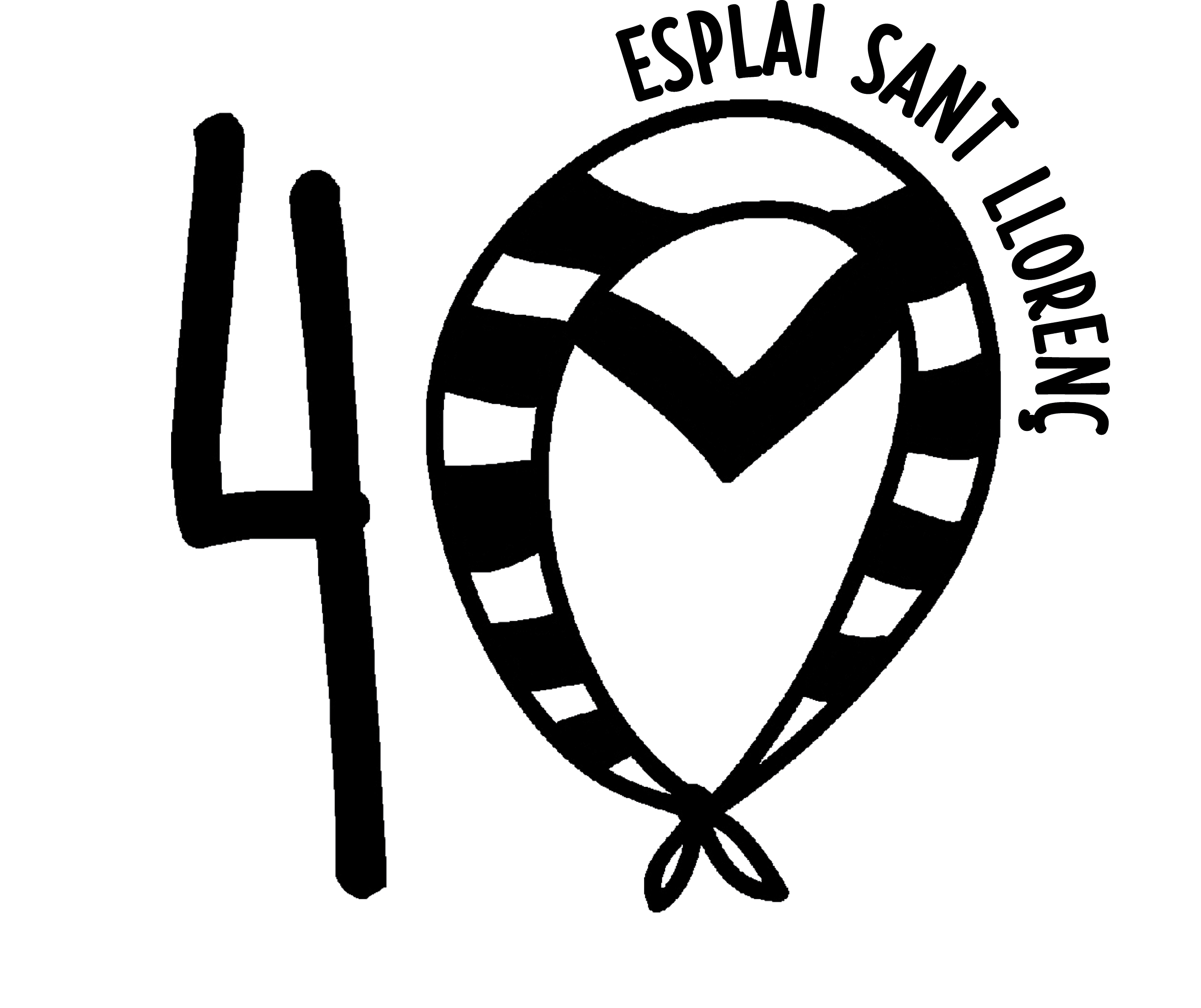 Logotip oficial de les celebració del 40è de l'Esplai Sant Llorenç